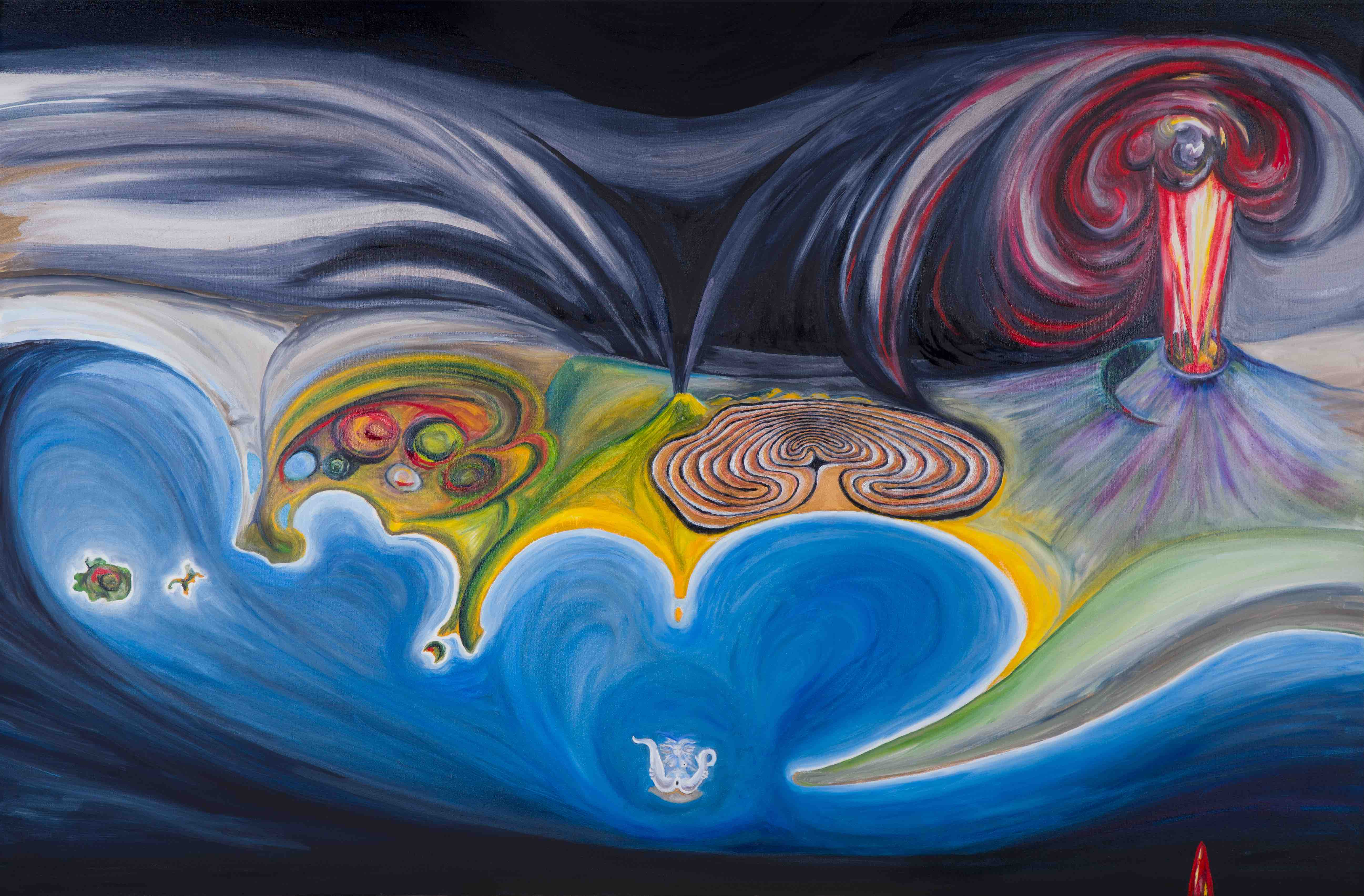 Dipinto di Donatella Mazzoleni